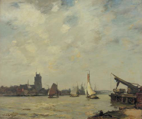 Schepen op de Merwede bij Dordrecht